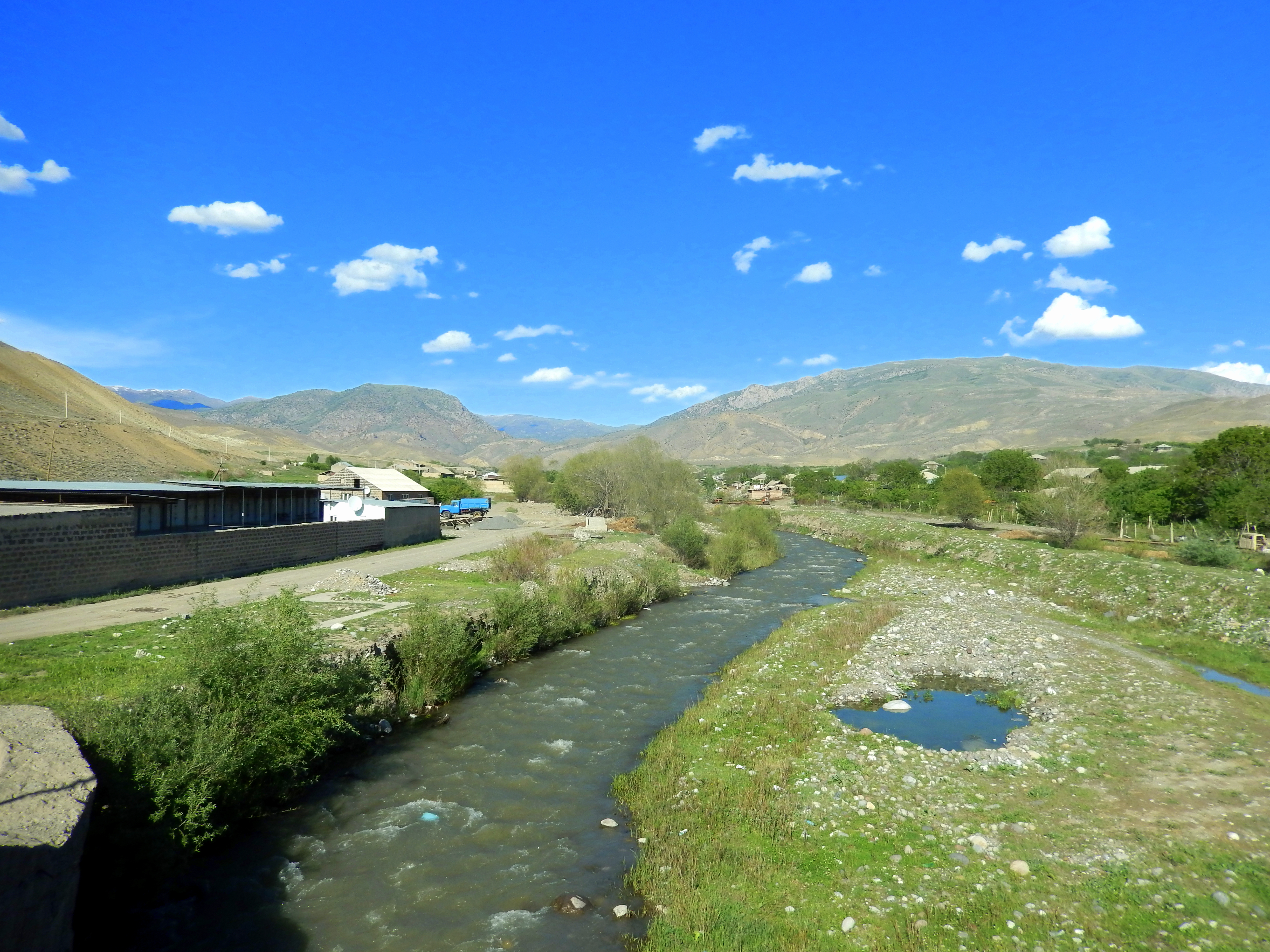 «Վեդի գետի ավազանի» բրածո ֆաունա